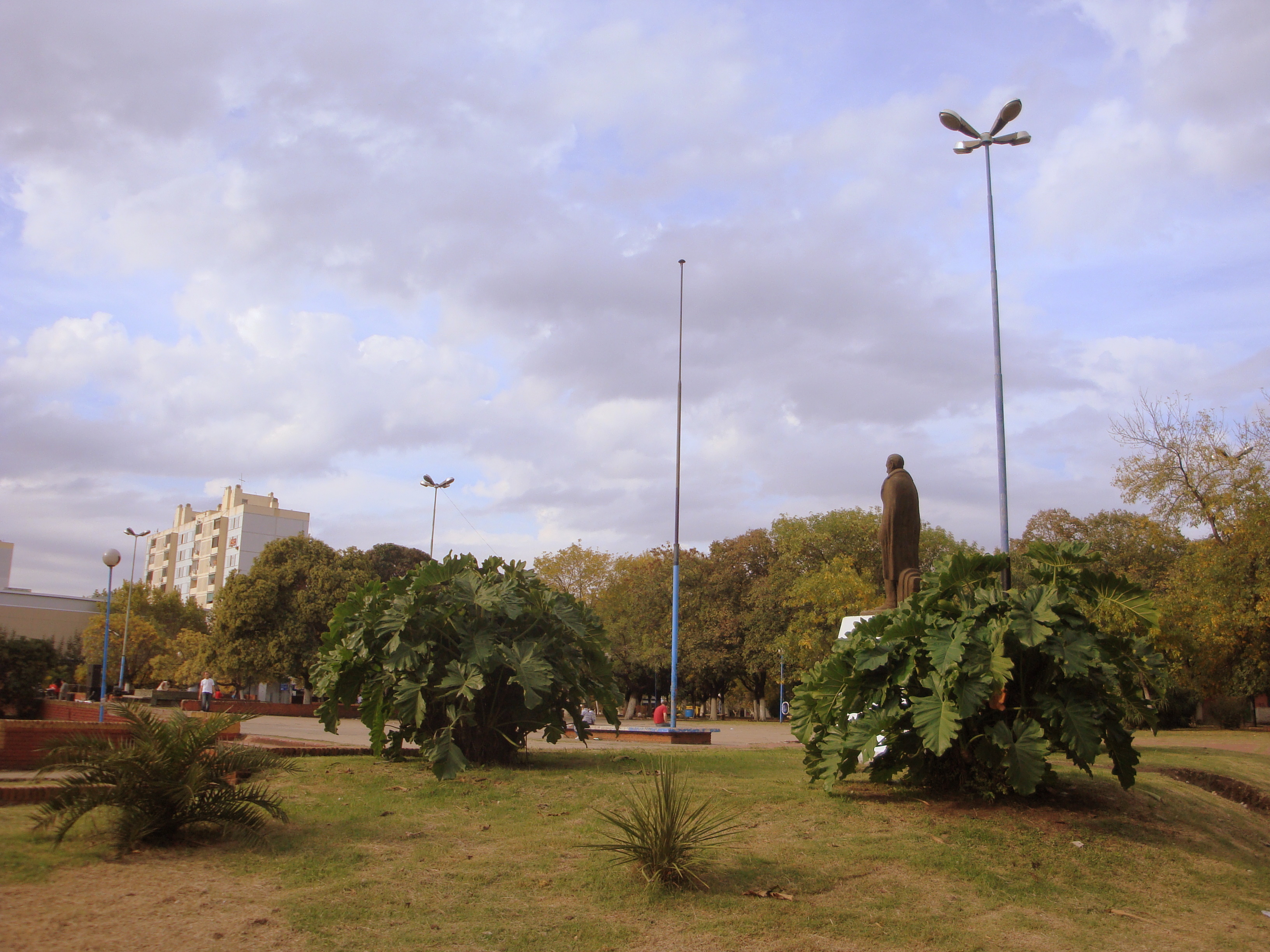 Plaza Mariano Moreno en Remedios de Escalada, Prov. de Buenos Aires.